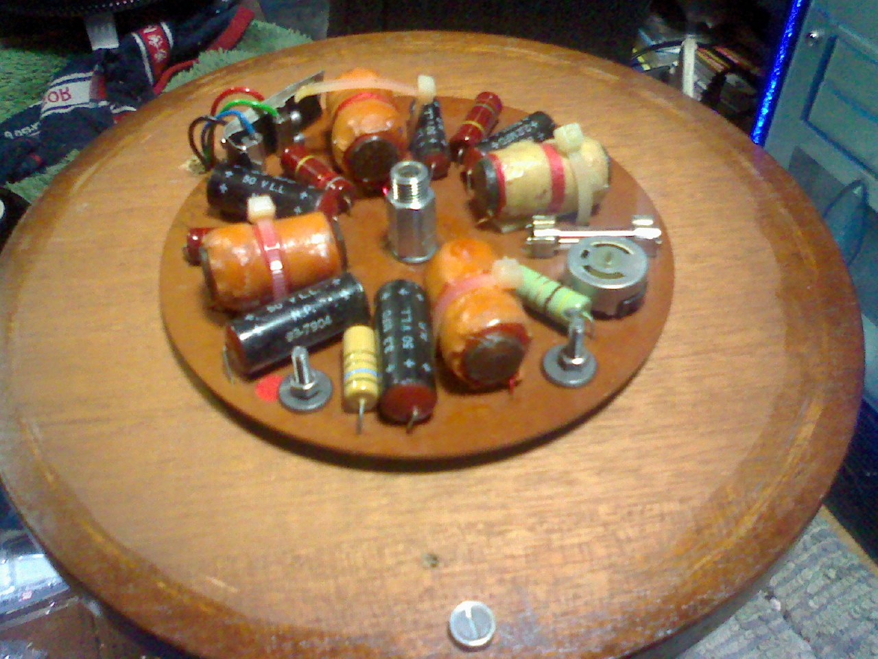 ジム・ロジャース149のネットワーク部分